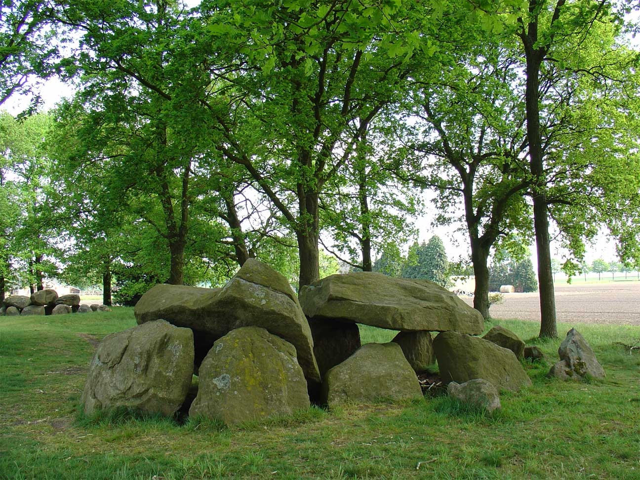 Hunebed D29 tussen Borger en Buinen